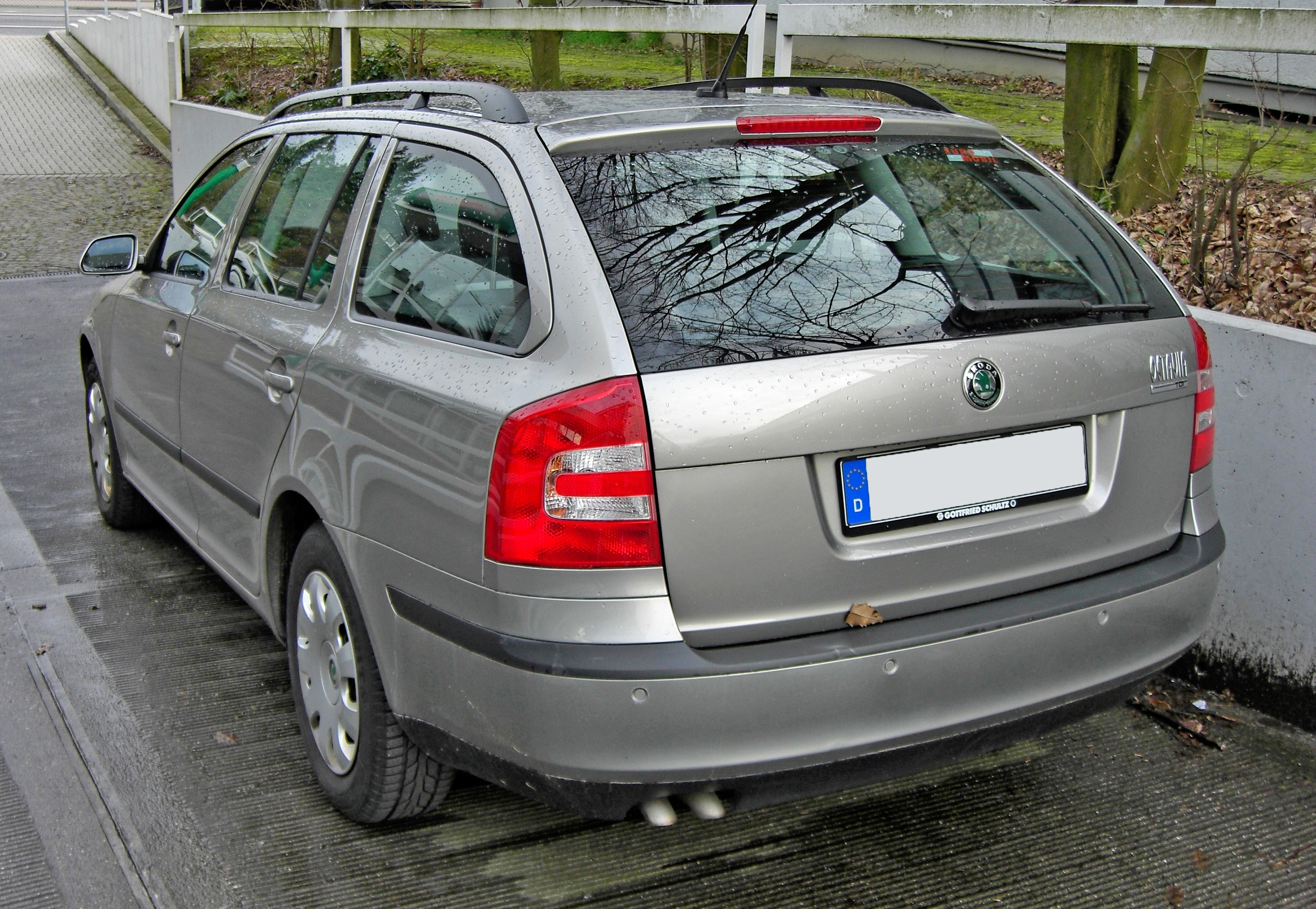 Skoda Octavia Combi